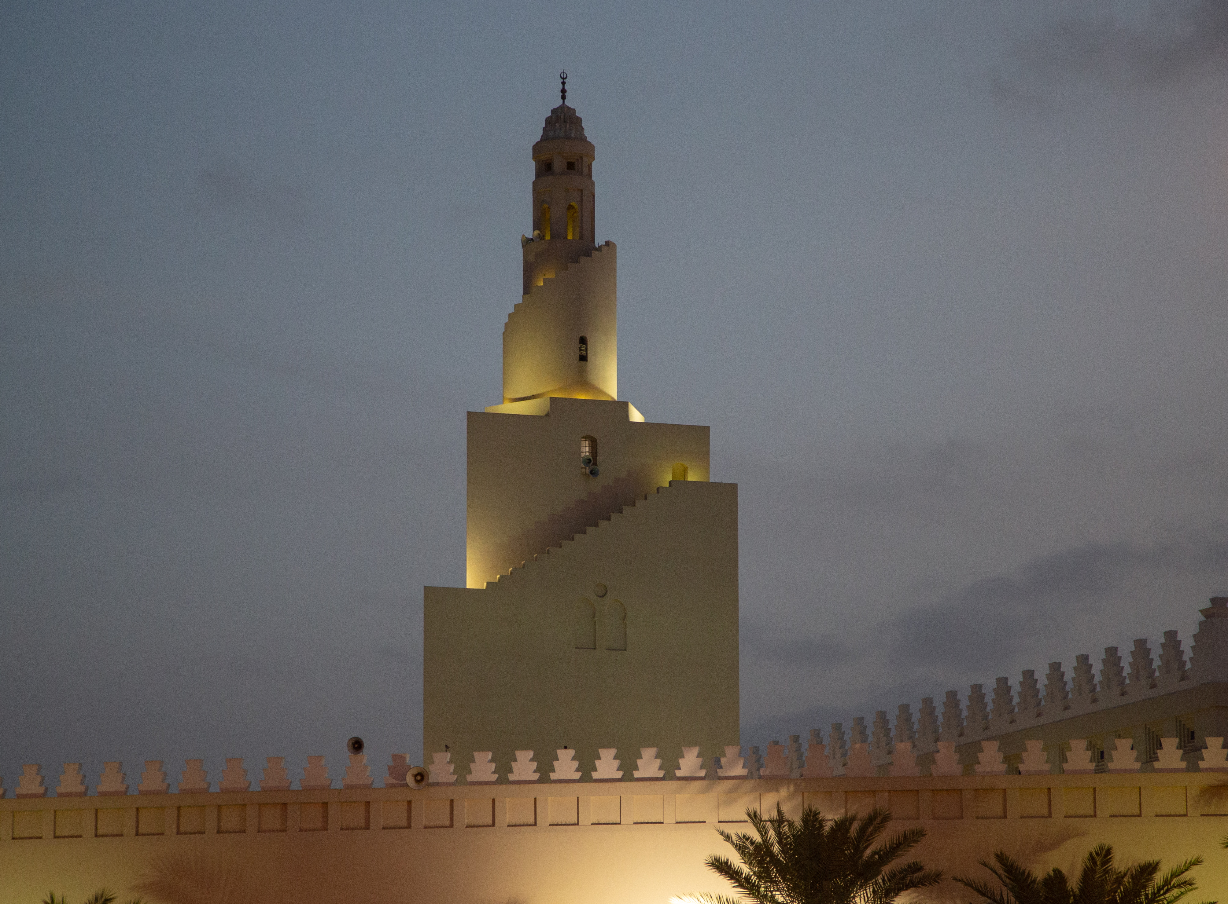 مسجد ميقات ذي حليفة